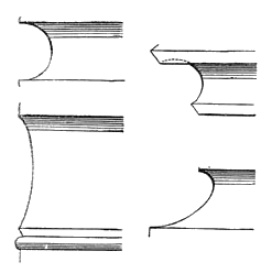 Hohlkehlen.